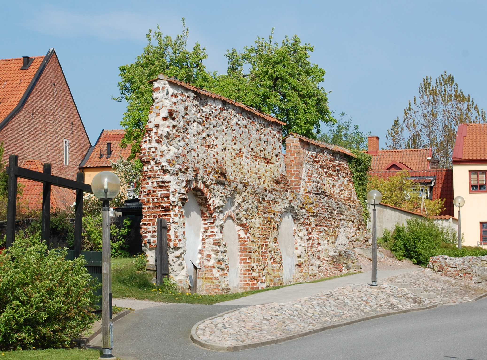 Ruine des Klosters in Åhus